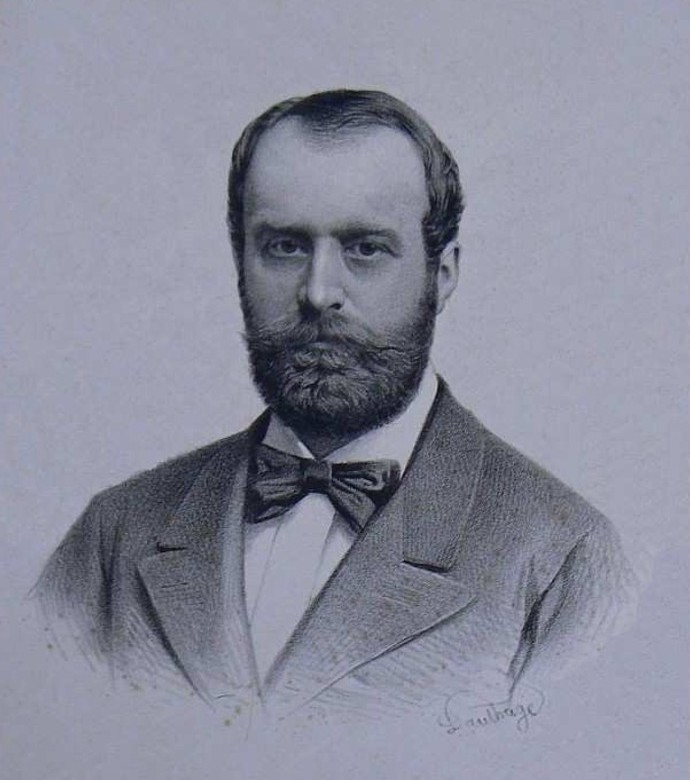 Ernst Olivier von Laudon (1832 - 1915), Rakouský šlechtic a politik.